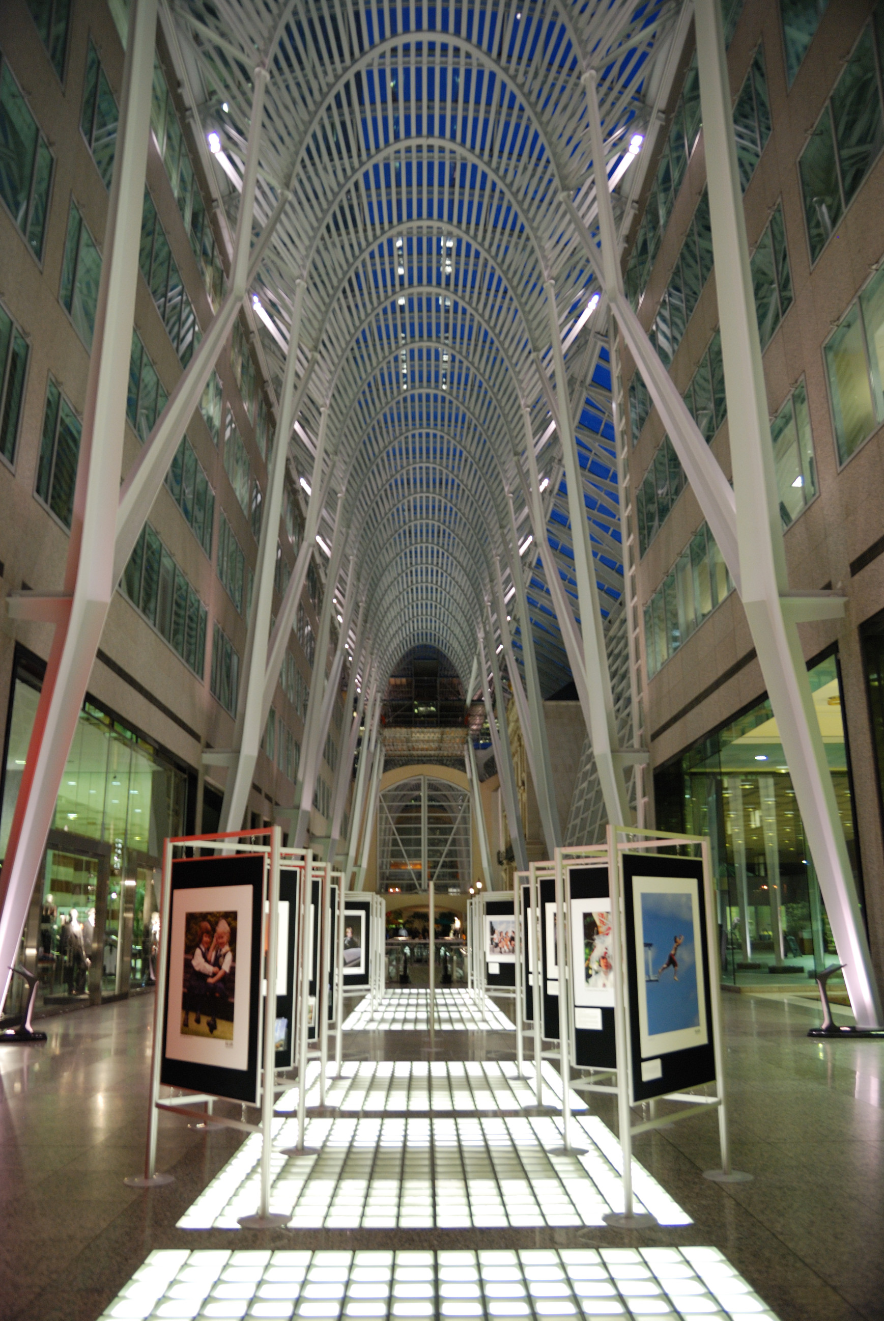 Toronto: Allan Lambert Galleria im BCE Place